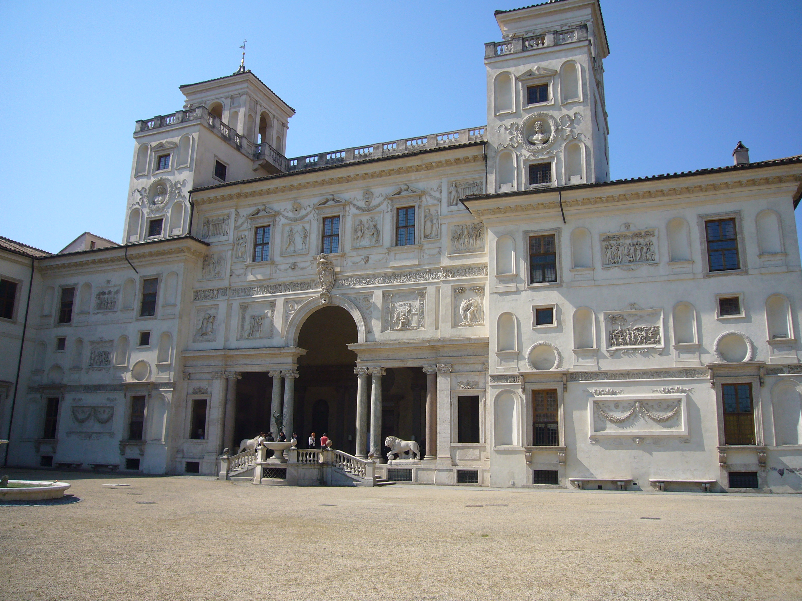 Roma, Villa Medici, facciata verso il giardino